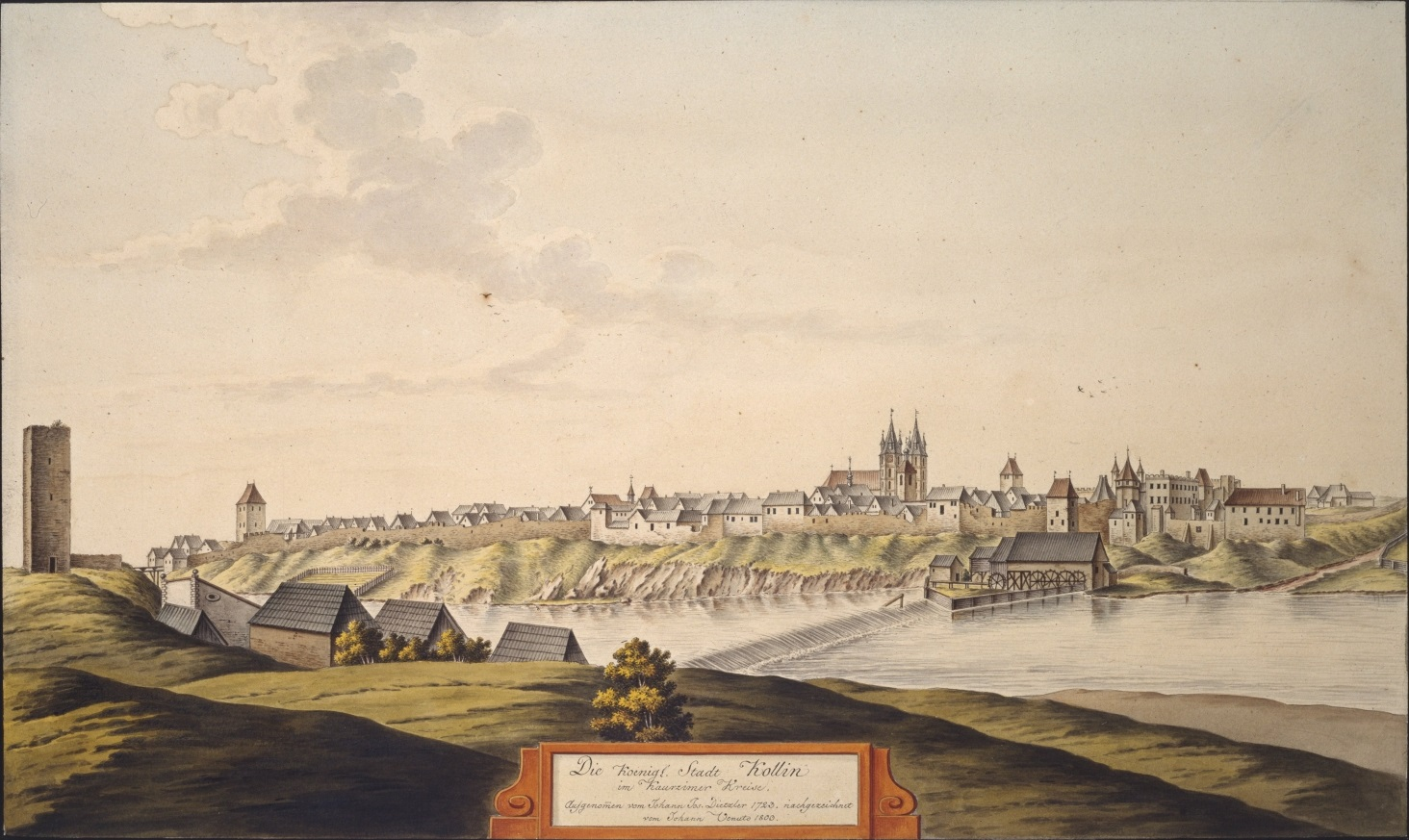 Kolín. Die koenigl. Stadt Kollin im Kaurzimer Kreise. Aufgenommen von Johann Jos. Dietzler 1723, nachgezeichnet von Johann Veunto 1803